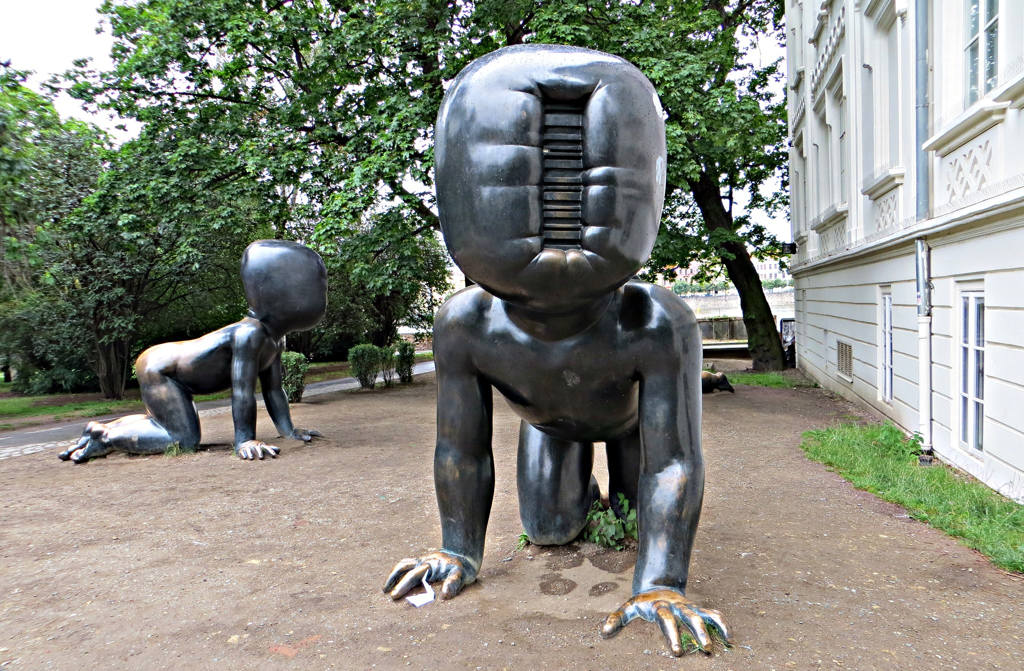 Museum Kampa